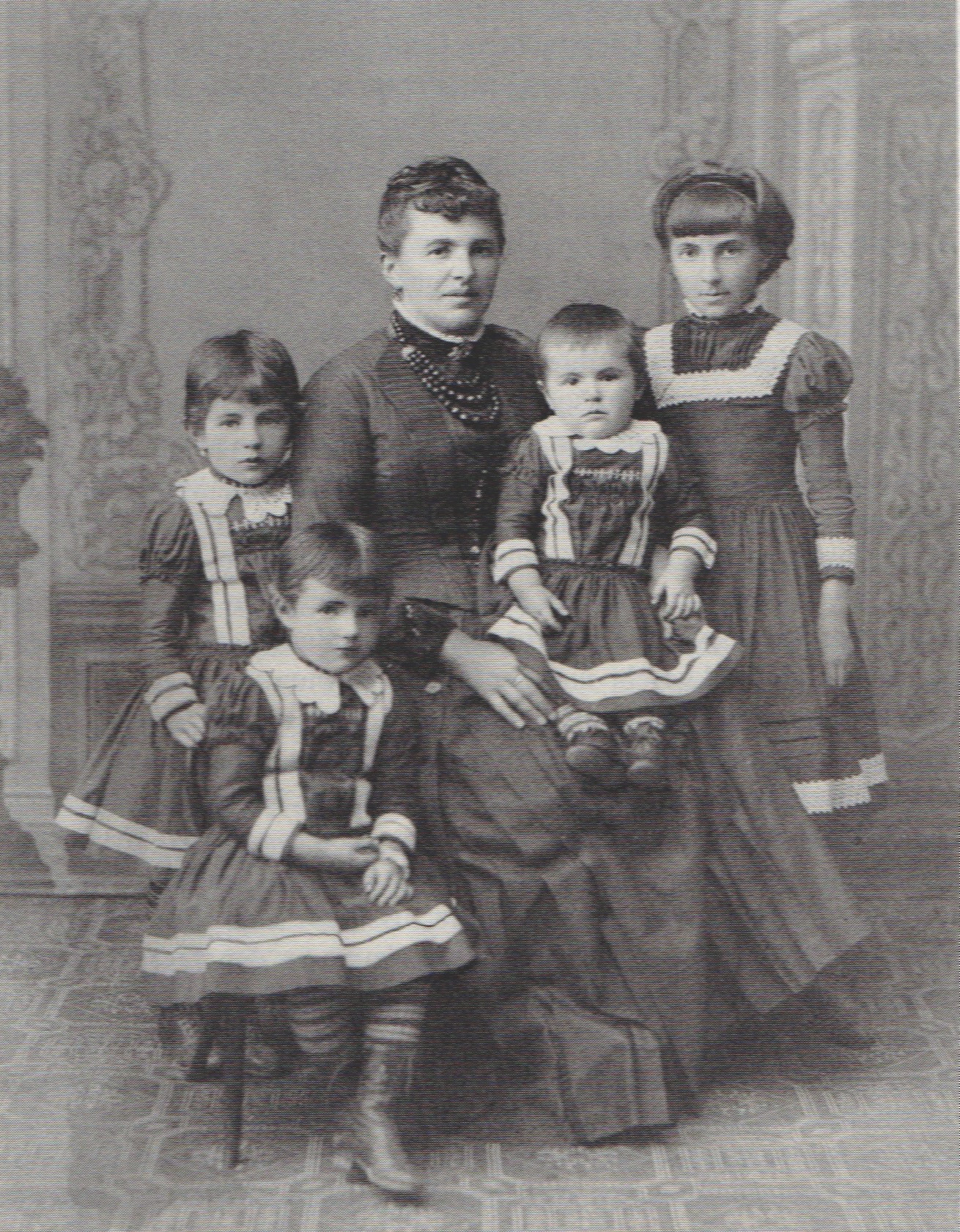 Regina Bernet-Lampert im Alter von 38 Jahren mit ihren 4 Töchtern